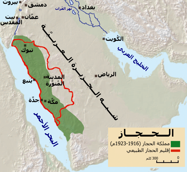 خارطة تُبيِّن حُدود مملكة الحجاز الهاشميَّة (1916 - 1923م)، وإقليم الحجاز الطبيعي.